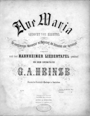 Gustav Adolf Heinze Ave Maria Gedicht von Haertel der Mannheimer Liedertafel gewidmet